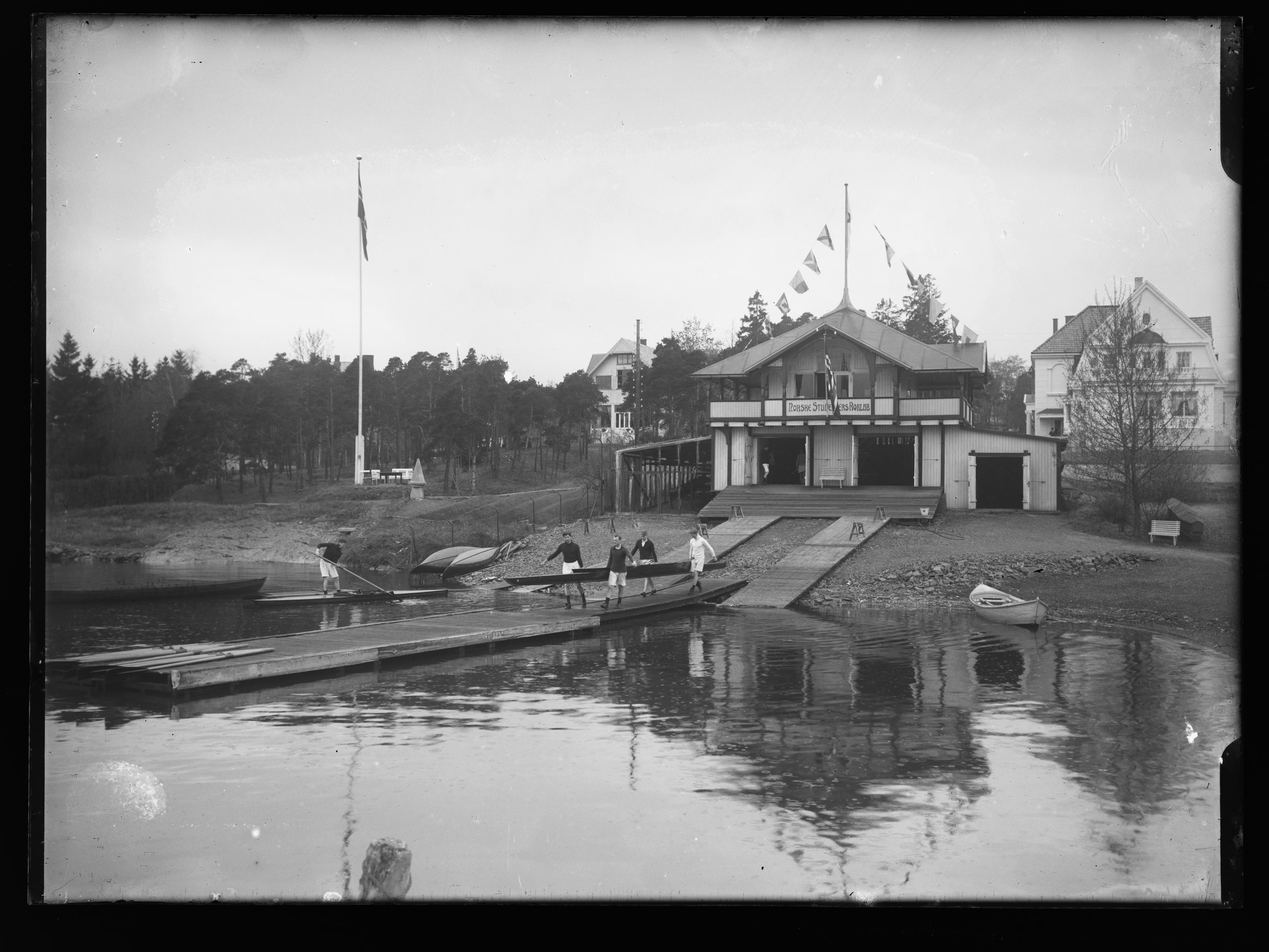 Bildet er hentet fra Nasjonalbibliotekets bildesamling. Anmerkninger til bildet var: Påskrift arkivark: Norske Studenters Roklub Arkivnummer: 440 Bygdøy, Oslo, Oslo